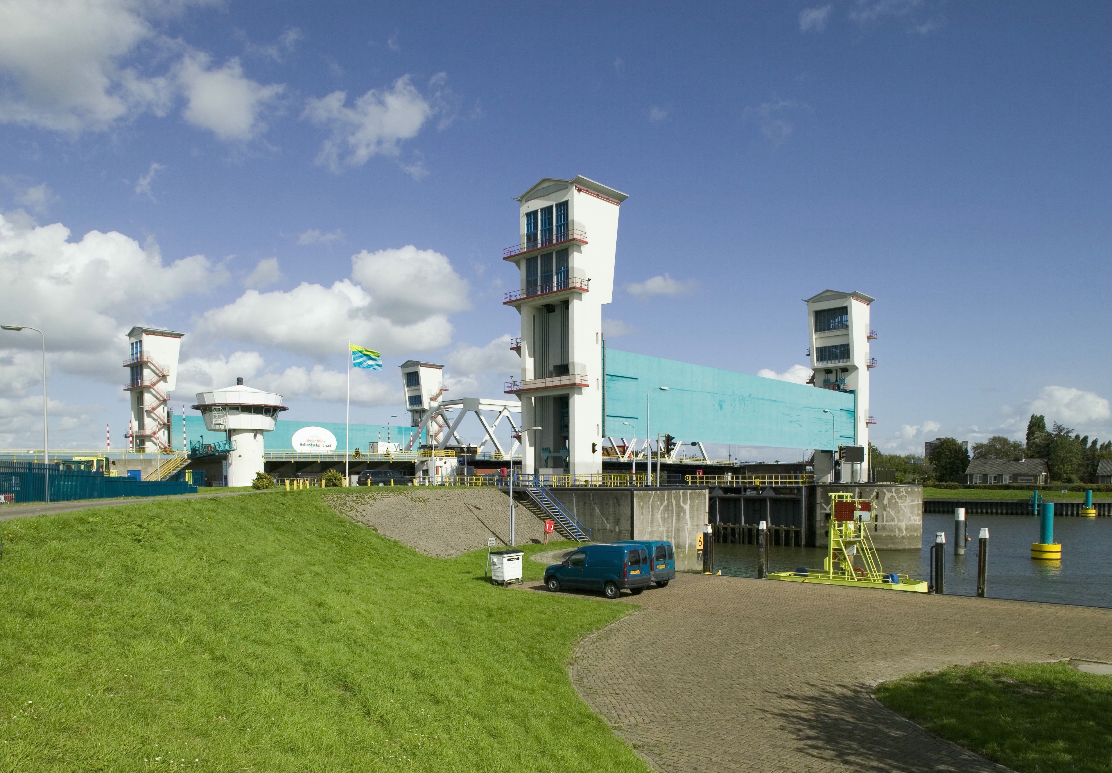 Stormvloedkering - Algerabrug: Overzicht Algerabrug, onderdeel van de Stormvloedkering, gezien vanaf de Ketensedijk (opmerking: Gefotografeerd voor Monumenten van Herrezen Nederland)